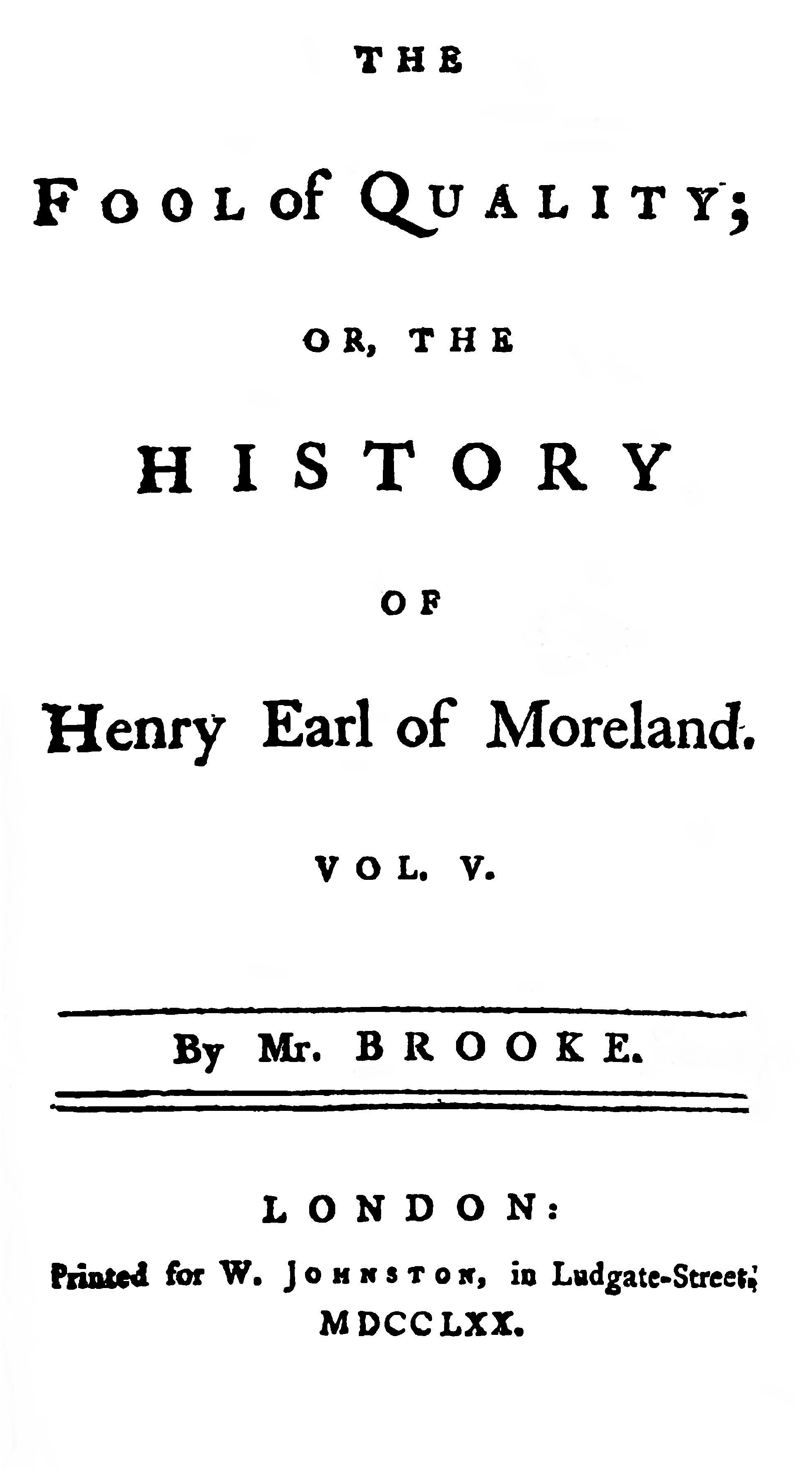 1st edition title page, volume 5